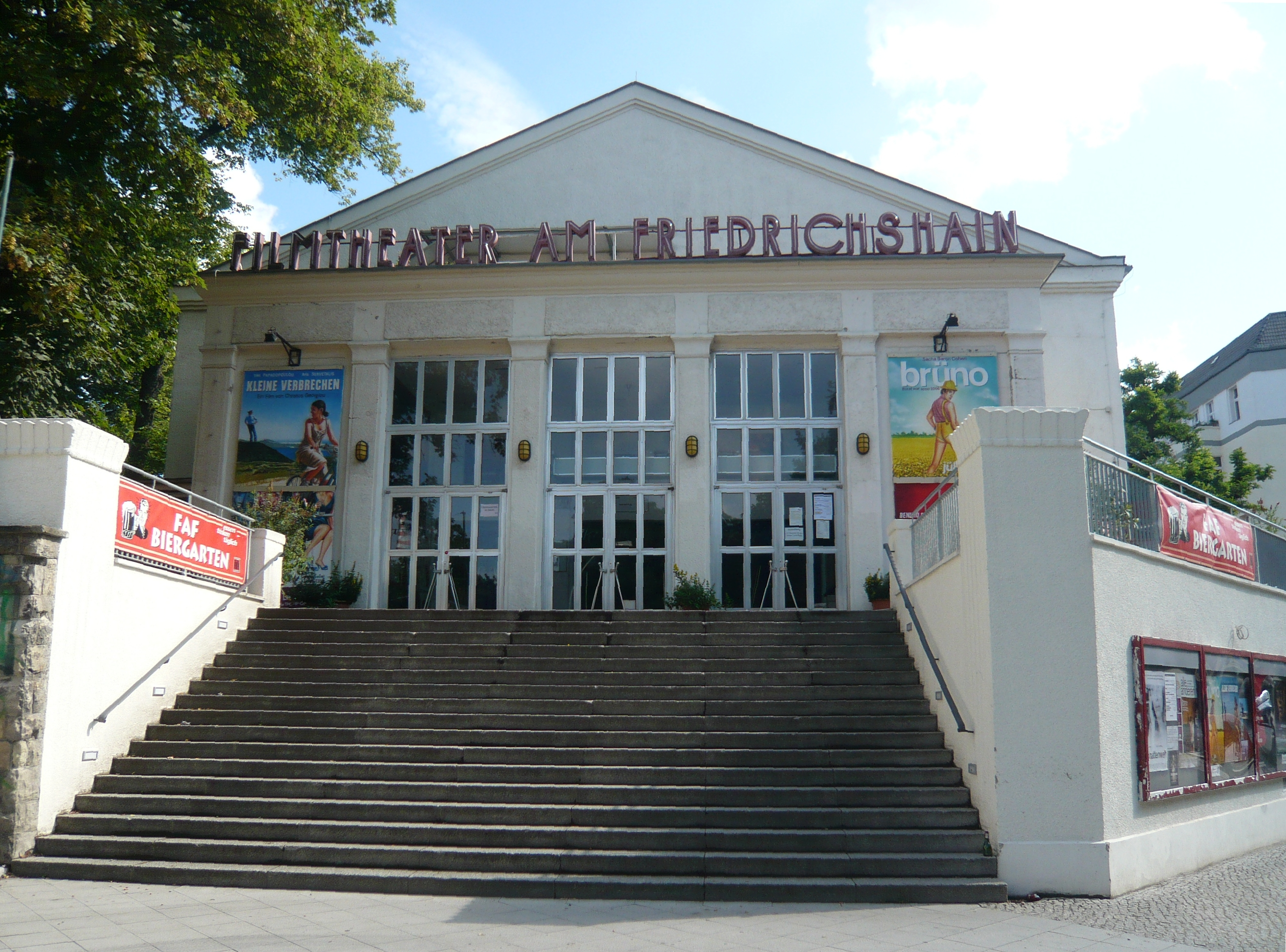 Filmtheater am Friedrichshain